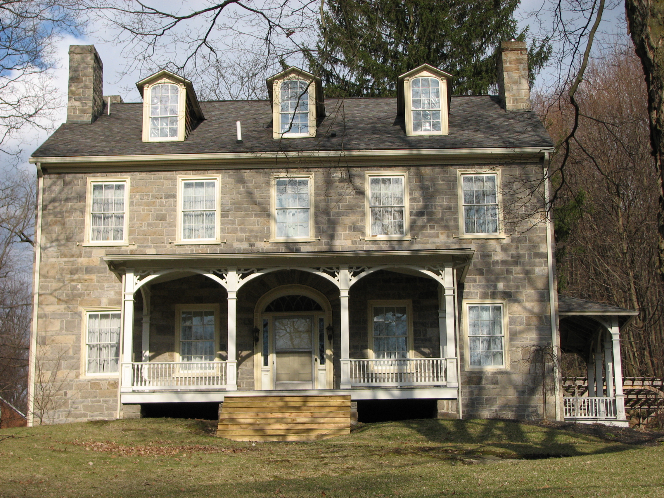 Bellefonte Forge House